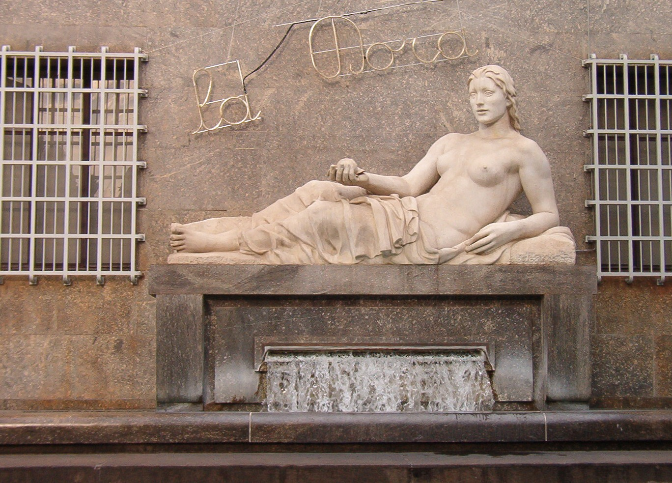 Statua raffigurante il fiume Dora Riparia - Piazza CLN - Torino - Italy